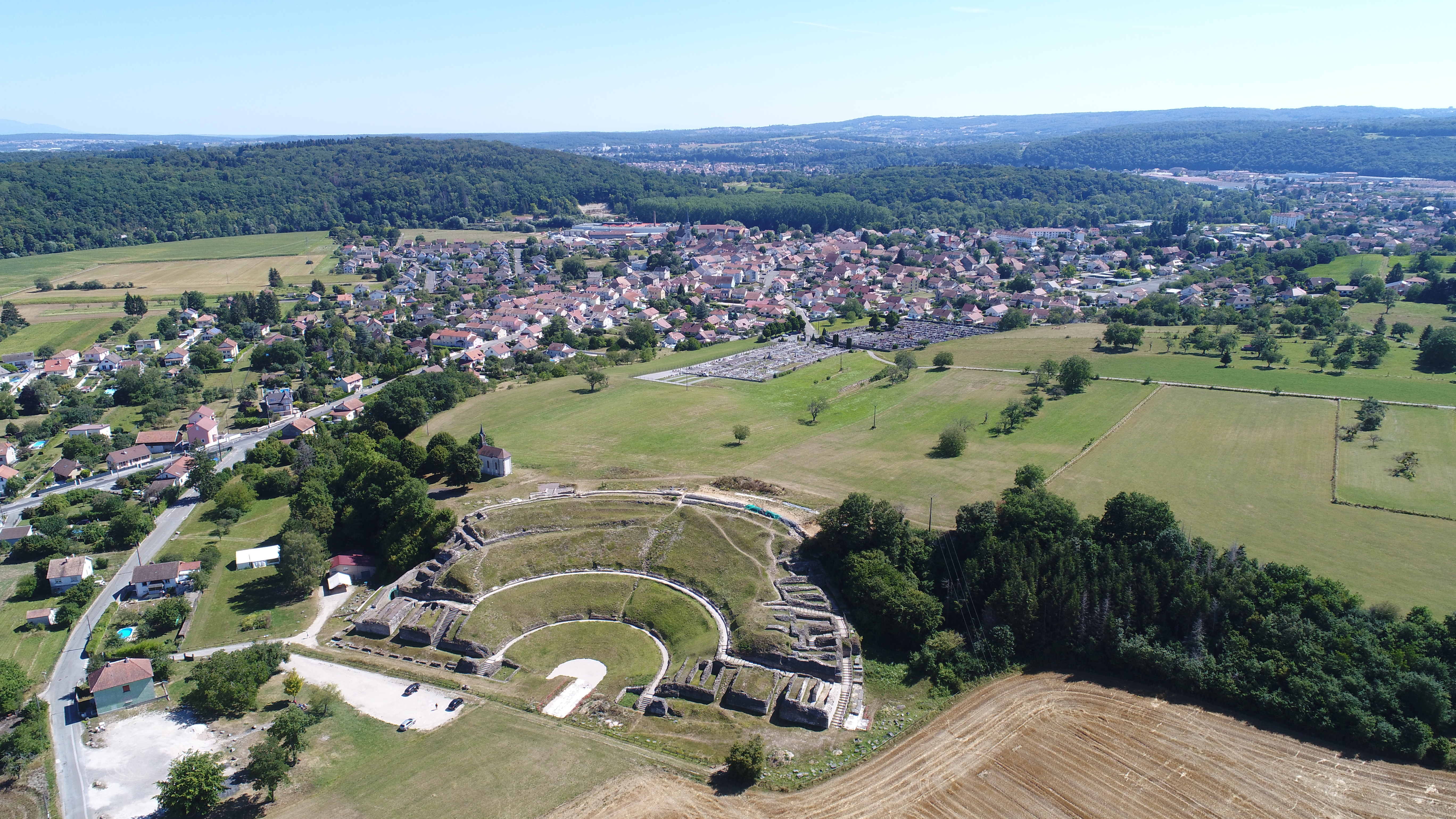 Vue aérienne du théâtre gallo-romain de Mandeure (25).